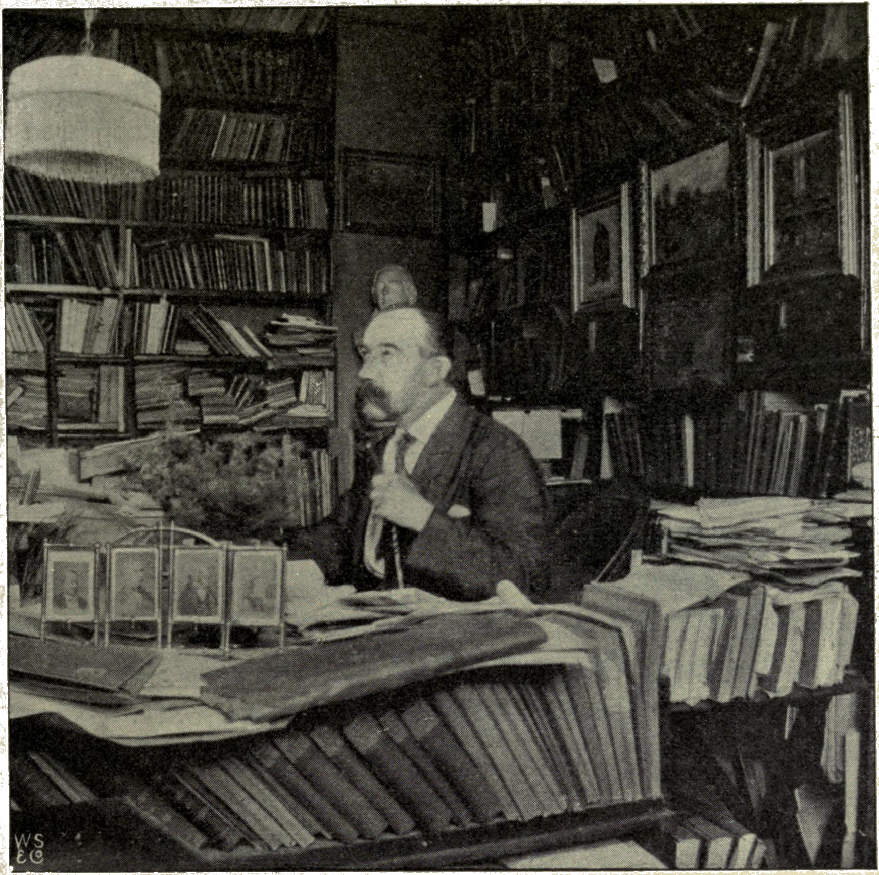 Den norske folkloristen Moltke Moe (1859–1913).